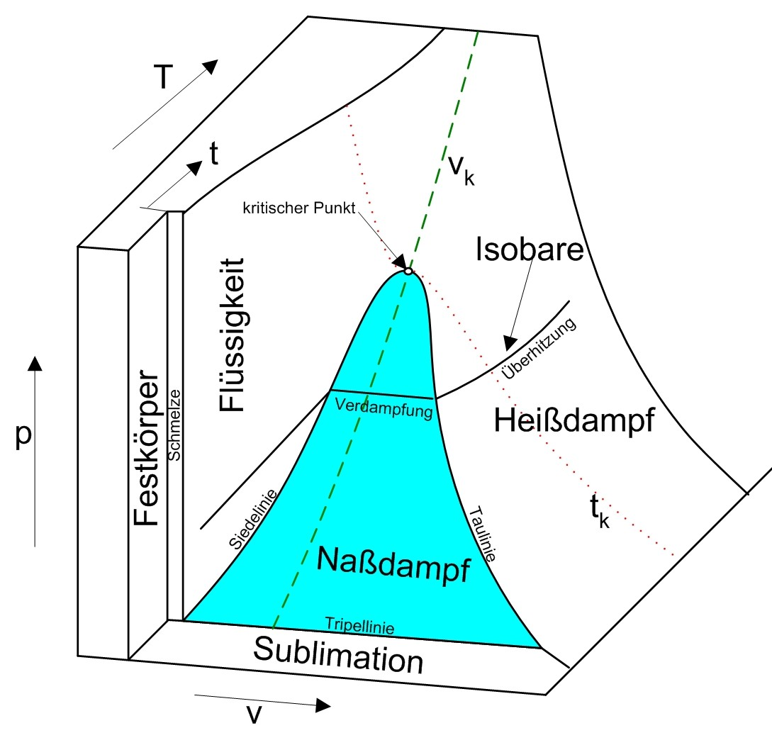 Qualitatives p-v-T-Diagramm für reine Stoffe